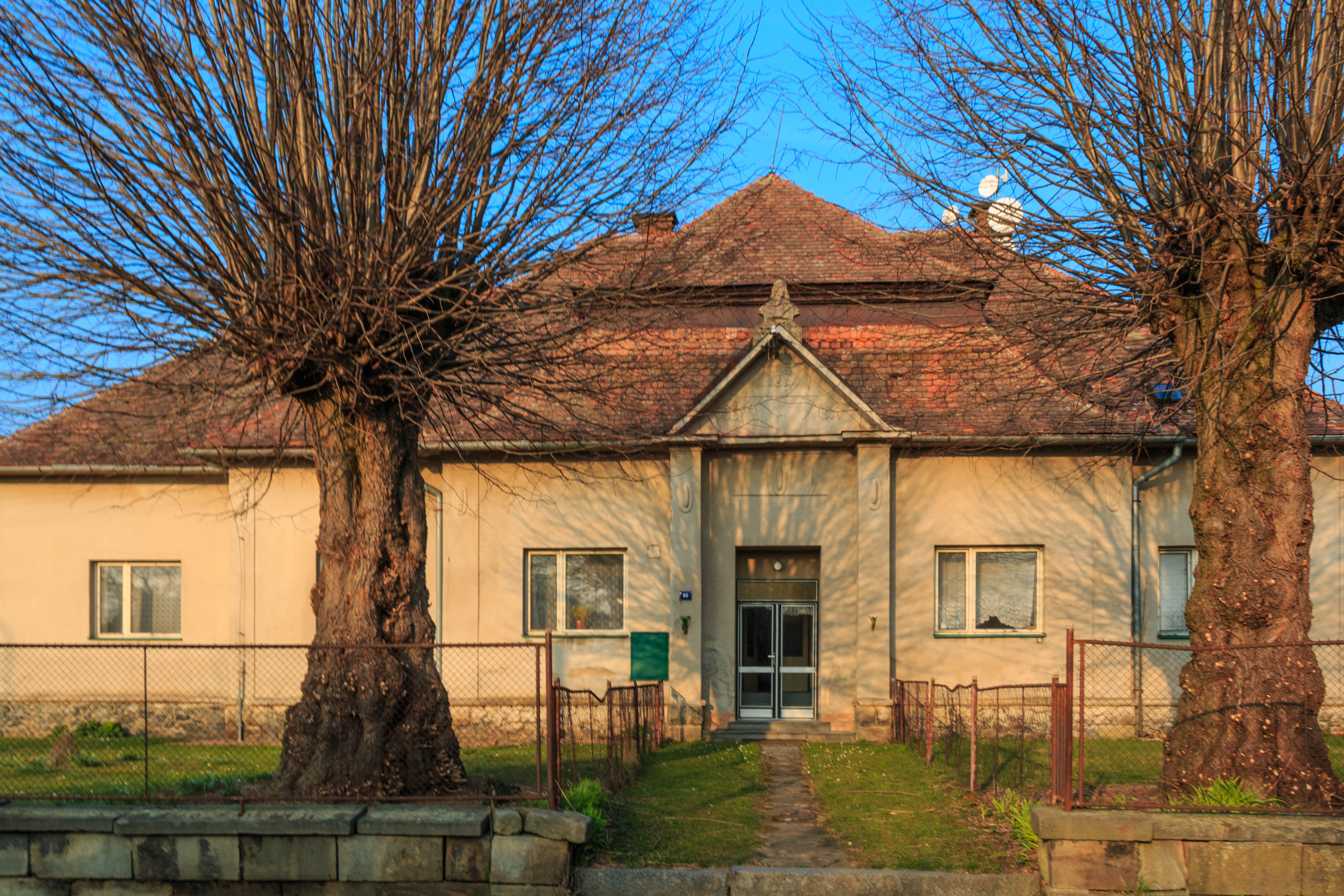 Hlína bývalá škola